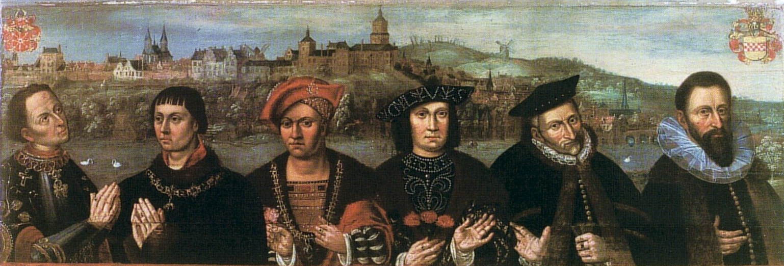 Die sechs Klever Herzöge, Adolf I., Johann I., Johann II., Johann III., Wilhelm V. und Johann Wilhelm (v.l.n.r.), ausgestellt im Städtischen Museum Haus Koekkoek in Kleve.